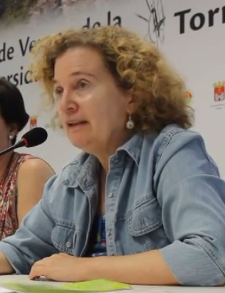 Rafael Guerrero modera la mesa redonda "Cómo contribuyen los mecanismos de justicia transicional a fortalecer las democracias? La justicia transicional en España". Participantes: Mirta Núñez-Días Balart, Jaime Ruiz, Alicia Moreno y Jordi Palou-Loverdos.